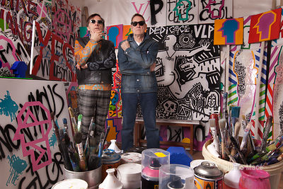 Les VLP dans leur atelier en 2014